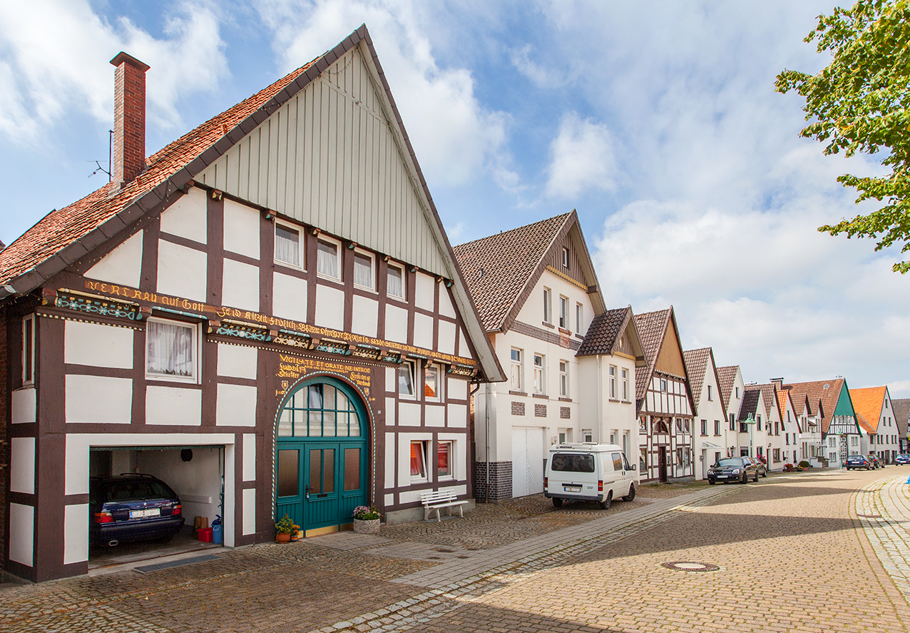 Barntrup (Kreis Lippe), Untere Straße